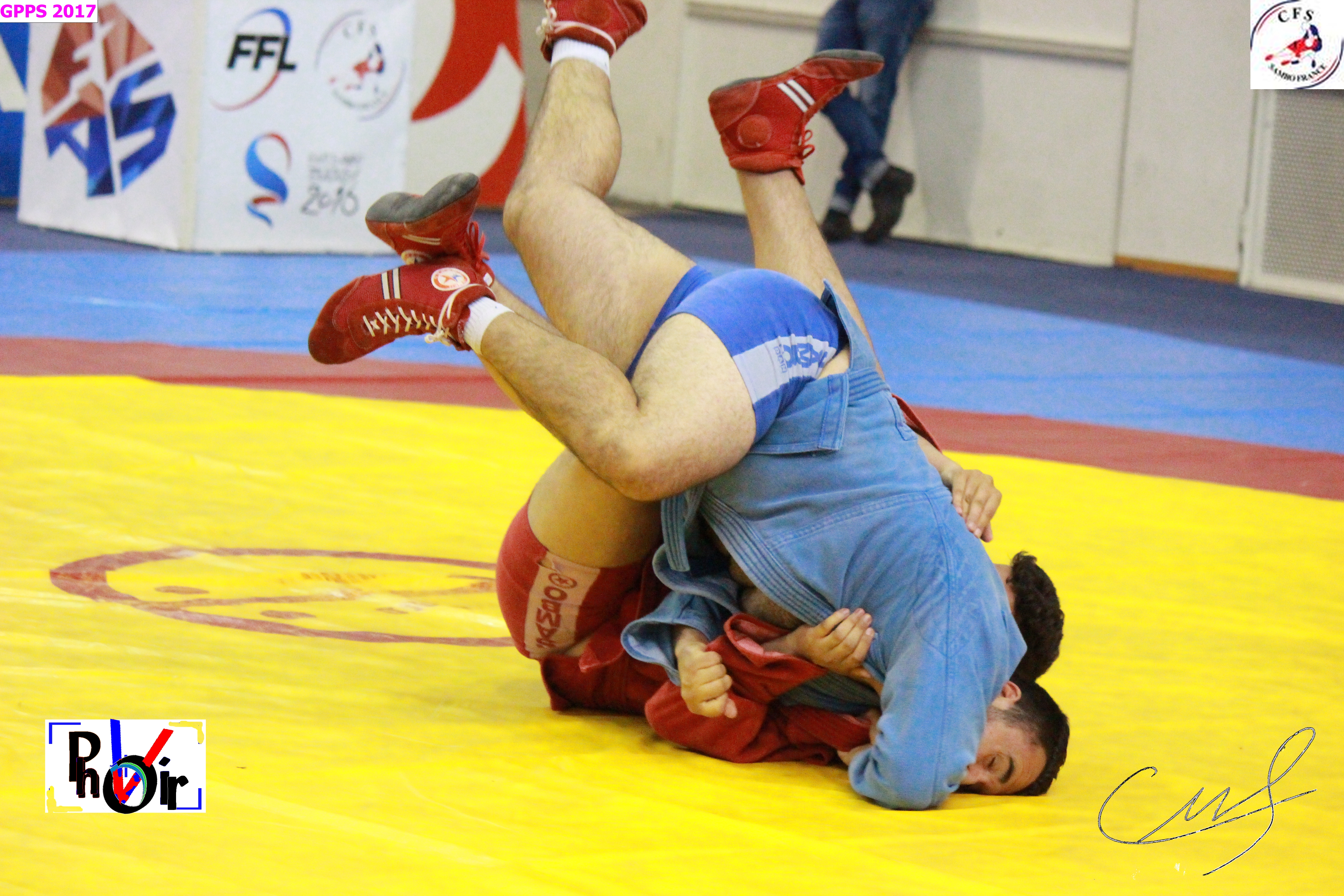 4 - Grand Prix Paris de Sambo (GPPS) 2017 Grand Prix Paris de Sambo 2017.